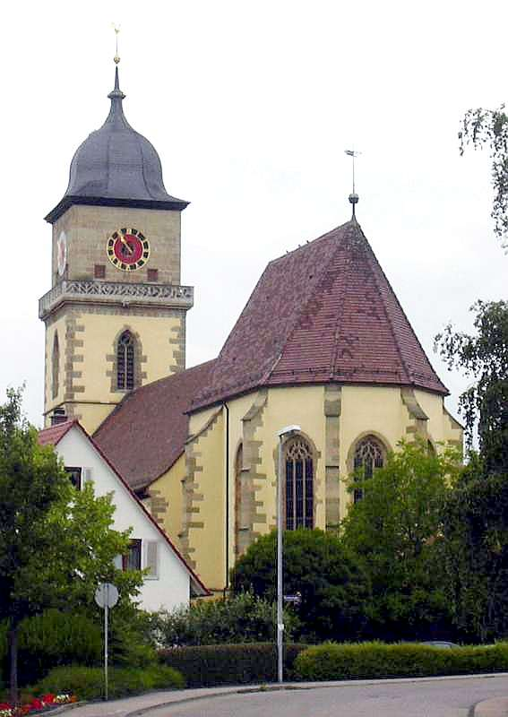 Pfarrkirche St. Georg in Schwieberdingen